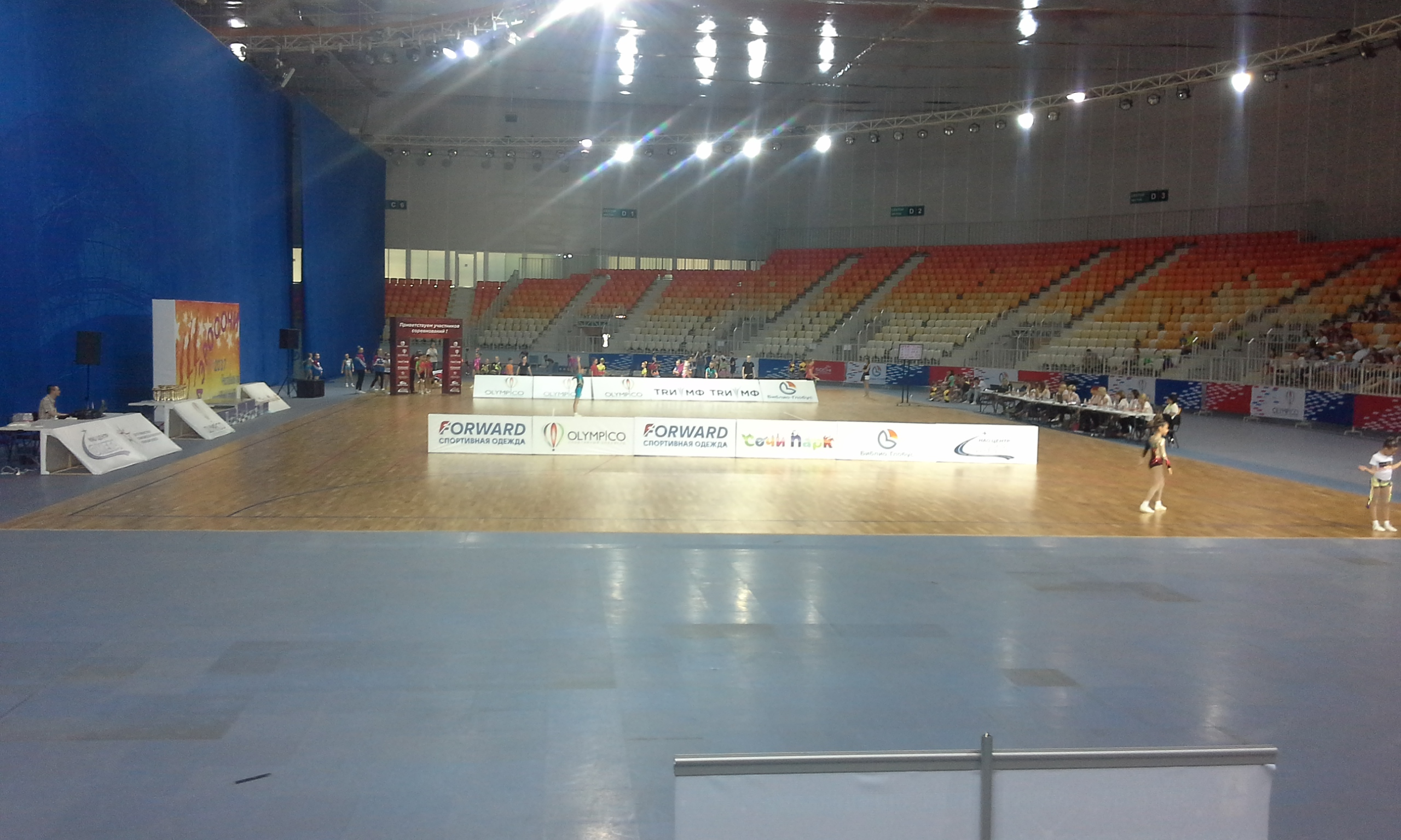 Сочи, Краснодарский край, Российская Федерация